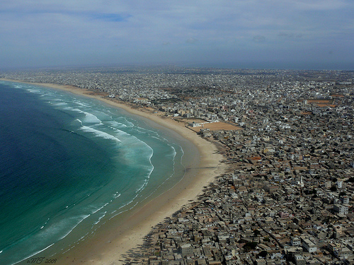 Dakar plage vue du ciel